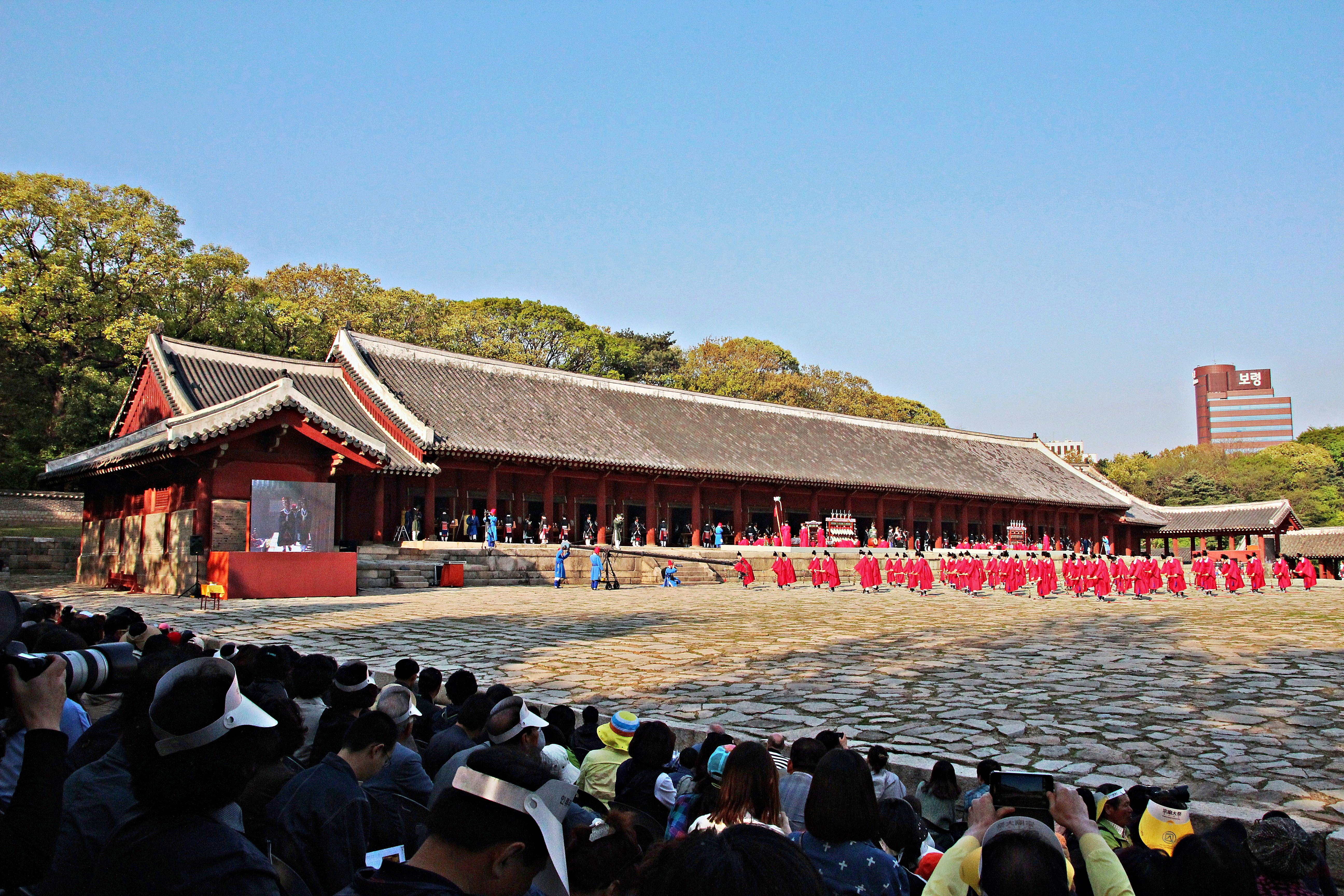 Jongmyo (종묘) is a Confucian shrine to perform memorial services for the deceased kings and queens of the Chosun Dynasty.